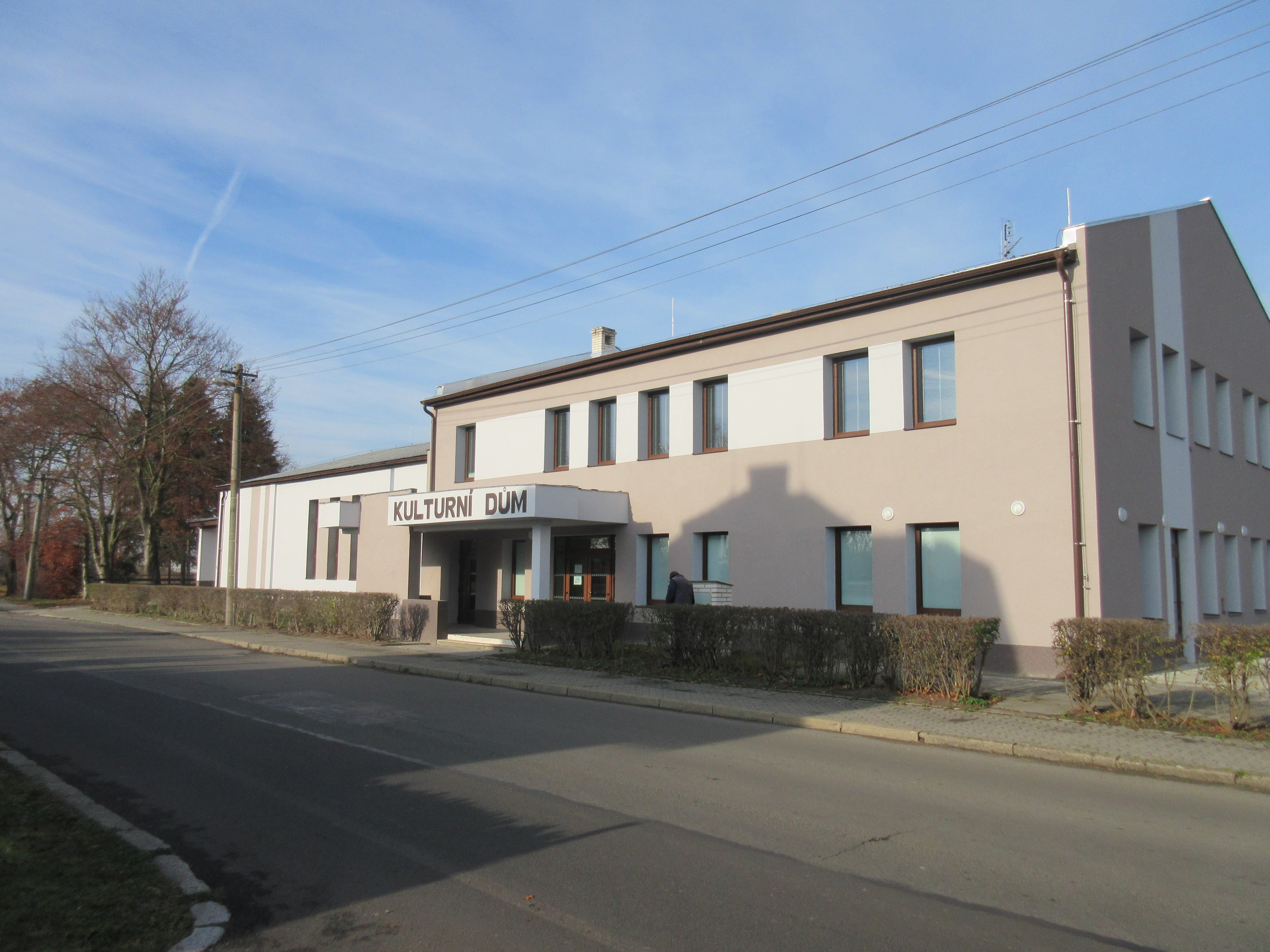 Kulturní dům v Zákupech po zateplení